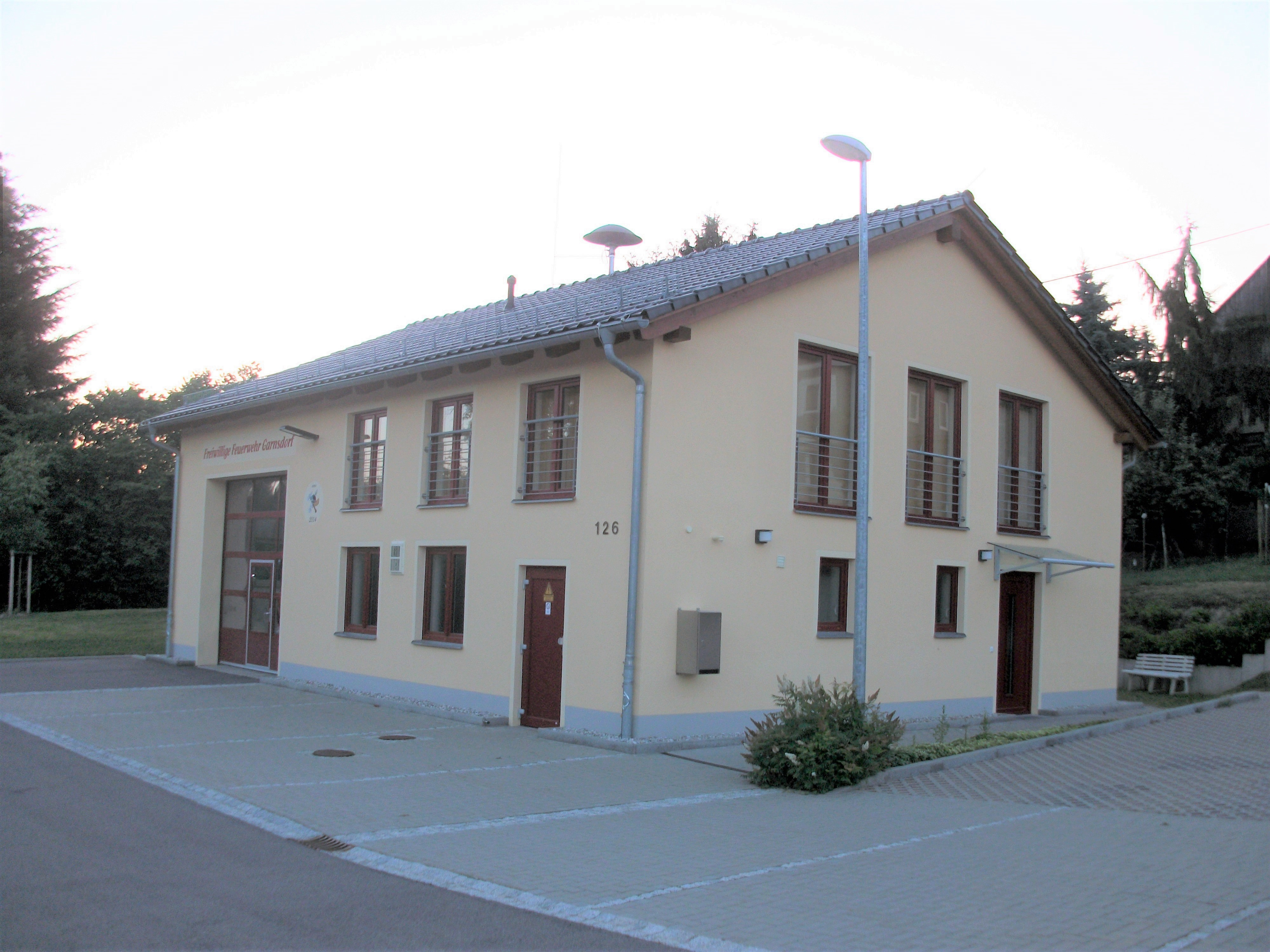 FFW Garnsdorf